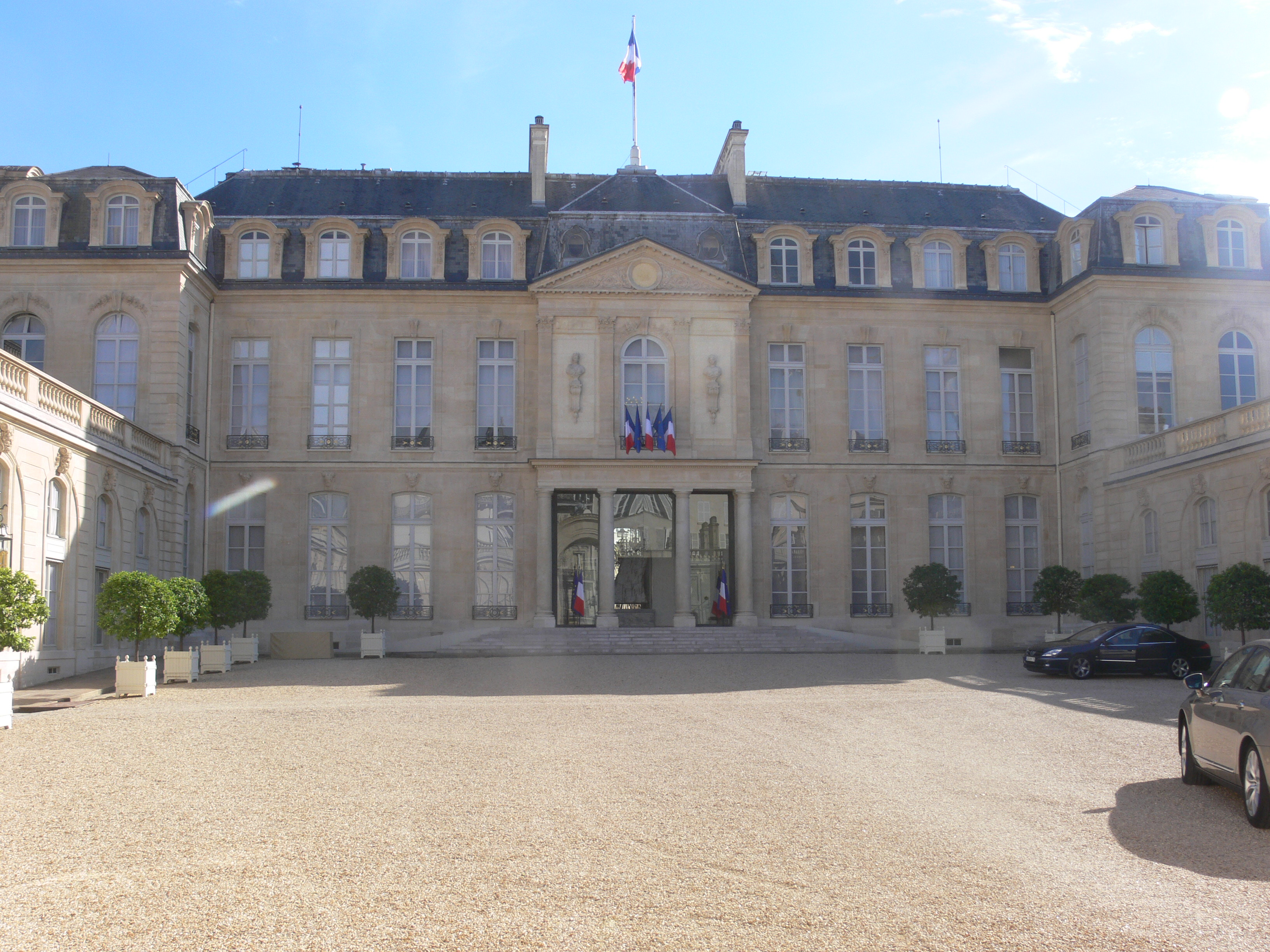 Paris - palais de l'Élysée - cour